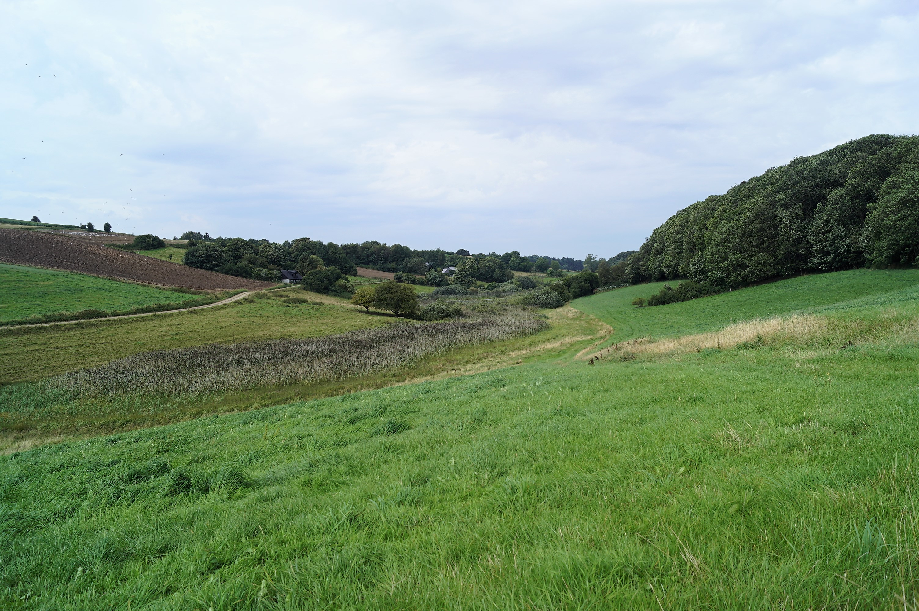 Pilbrodalen set fra sydøst